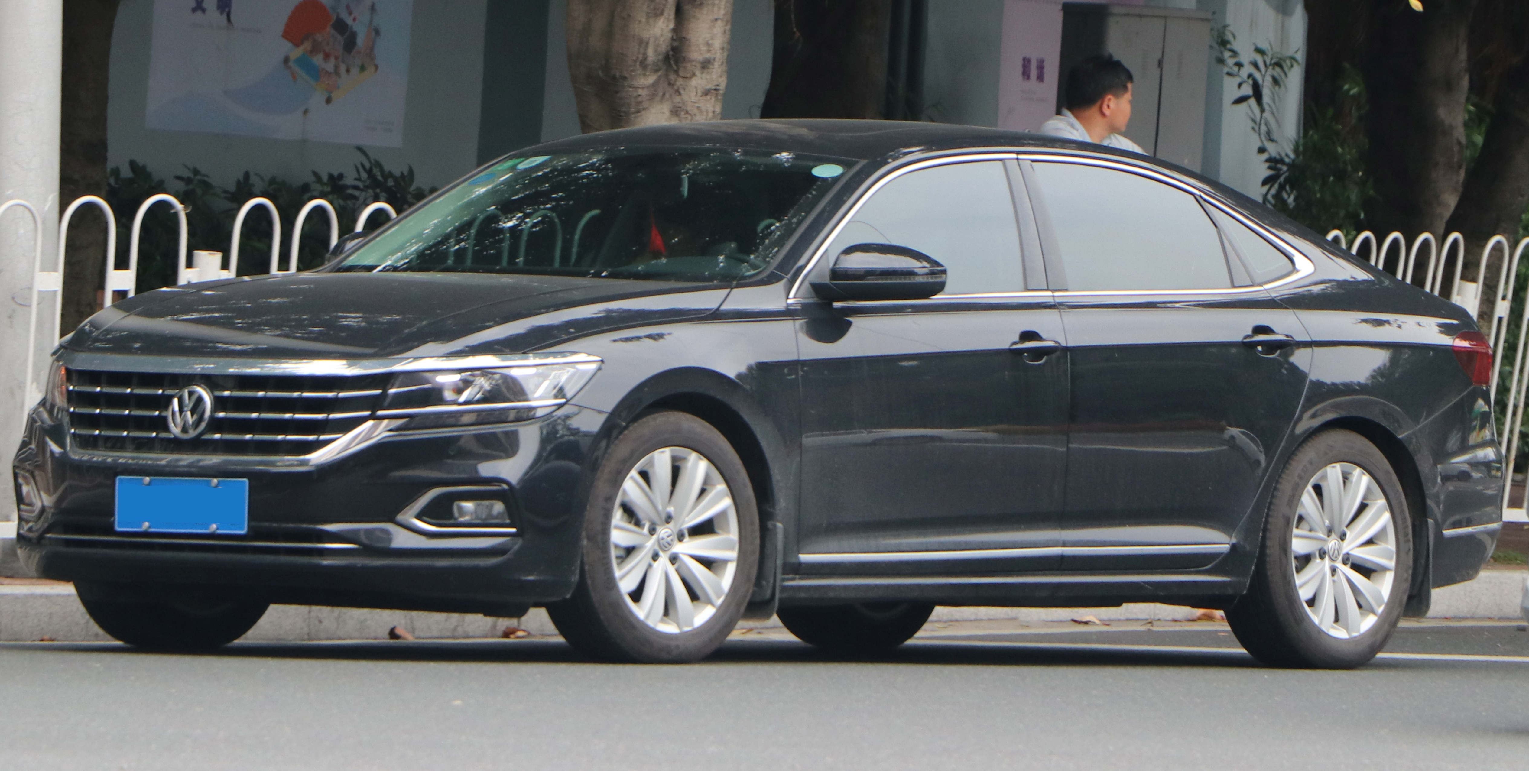 SAIC Volkswagen Passat 2018 in Guangzhou